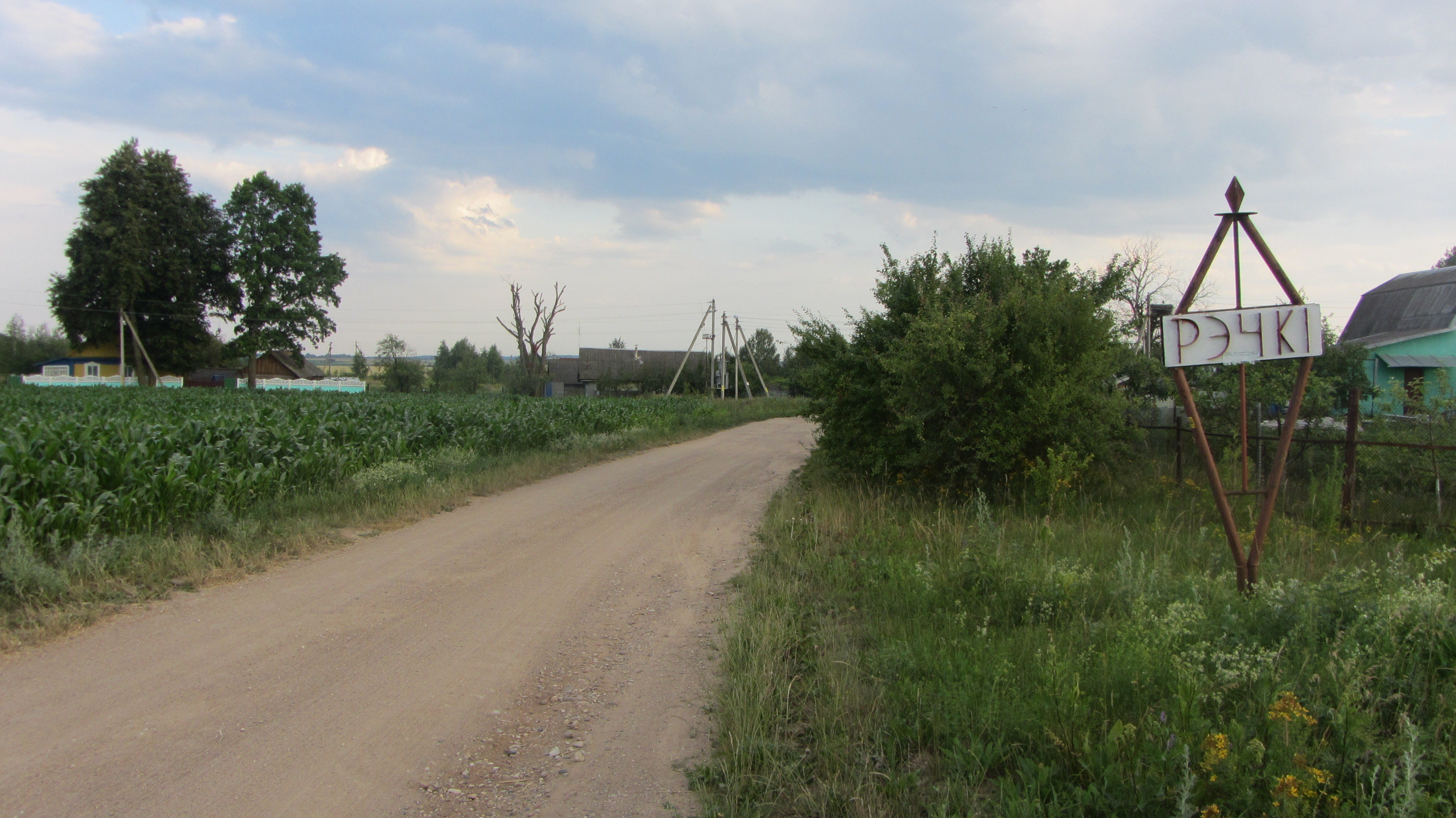 Вёска Ленінскі, Пухавіцкі раён. Скасаваны пасёлак Рэчкі.